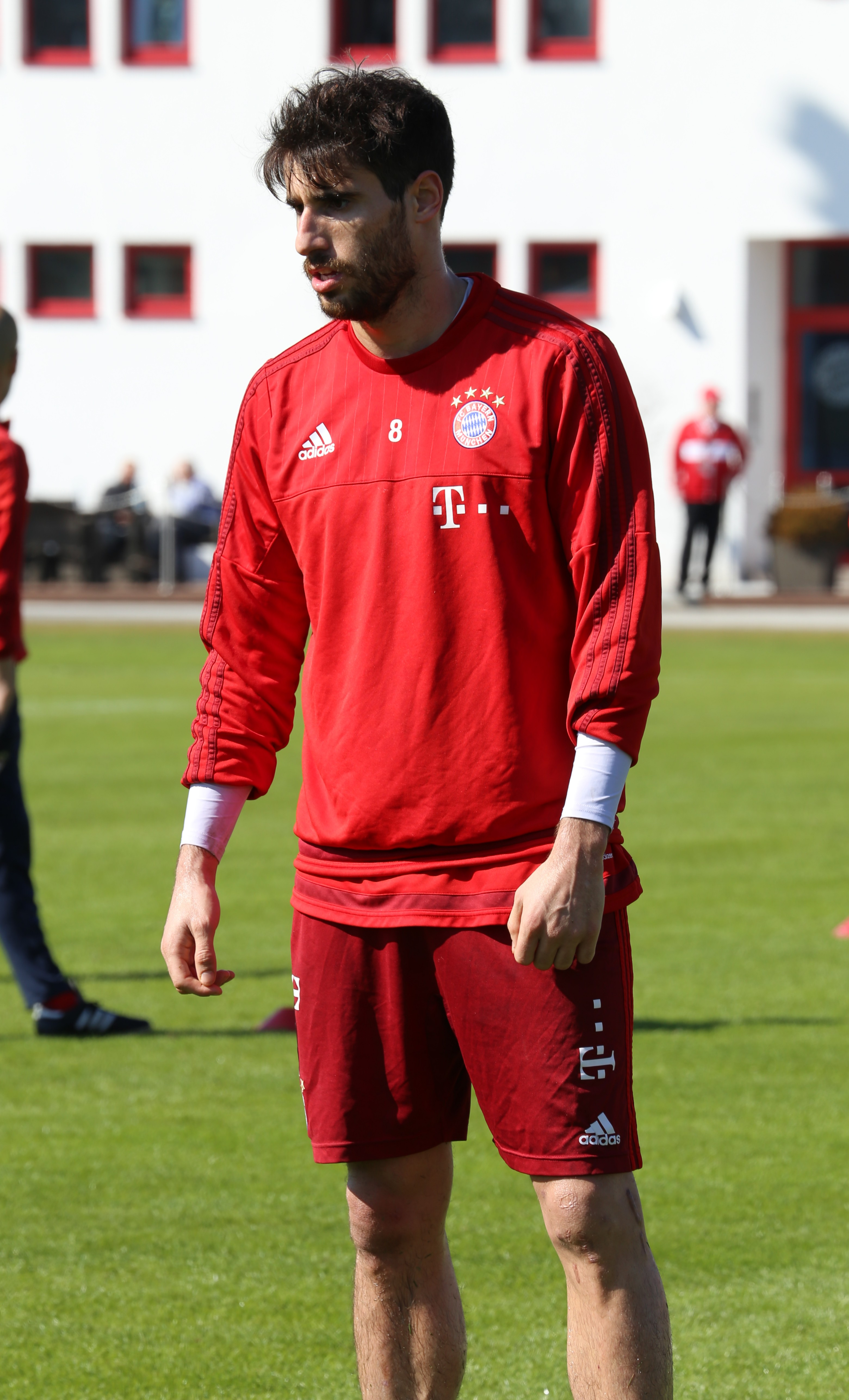 Javi Martínez beim Training auf dem Gelände des FC Bayern München